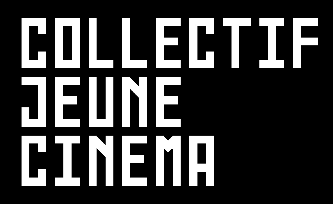 Logo Collectif Jeune Cinéma